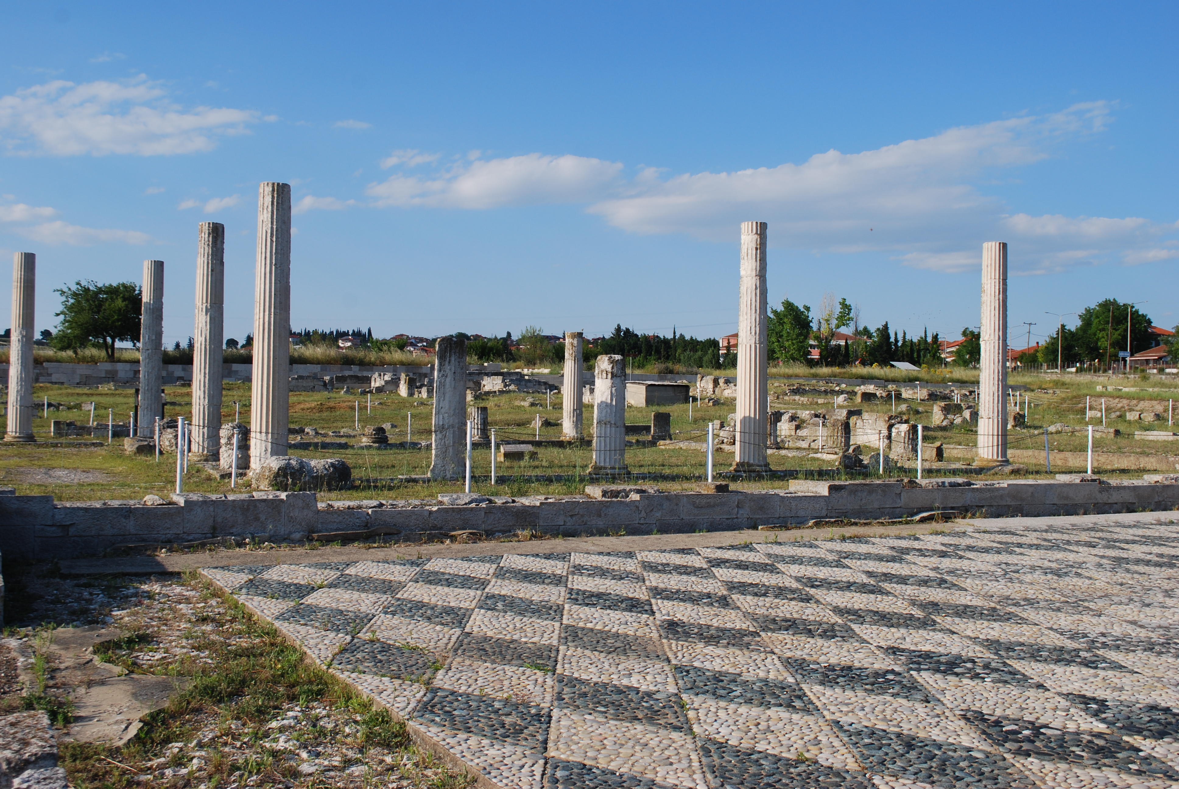 Vue du site archéologique de Pella, capitale du royaume de Macédoine à l'époque d'Alexandre le Grand.